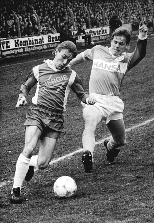 ADN-ZB-Weisflog -4.3.1989-hko- Cottbus: Fußball-Oberliga- Energie Cottbus - FC Hansa Rostock 2:2- Der Cottbuser Spieler Olaf Desser (l.) im Zweikampf mit Axel Rietentist. Information added by Wikimedia users.Korrekter Namen der Fußballer: Axel Rietentiet und Olaf Besser